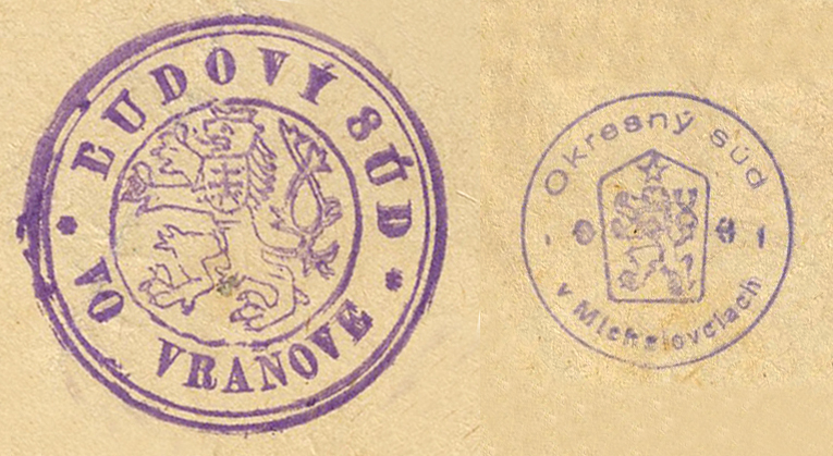 Pečiatka Ľudového súdu vo Vranove, používaná v päťdesiatych rokoch a pečiatka Okresného súdu z Michaloviec zo šesťdesiatych rokov, keď Vranov stratil postavenie okresného mesta.